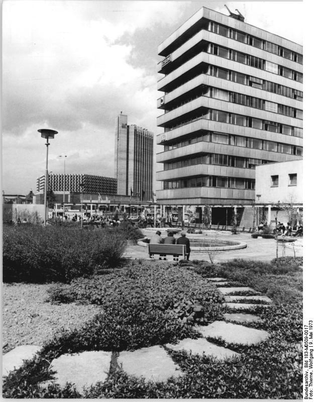 Chemnitz, "Haus der Industrieverwaltungen" ADN-ZB Thieme 9.5.1973 Karl-Marx-Stadt: Den 20. Jahrestag der Umbenenung ihrer Heimatstadt in Karl-Marx-Stadt begehen die Einwohner der sächsischen Industriemetropole am 10.5.1973. Im Posthof von Karl-Marx-Stadt. Rechts: das Haus der Industrieverwaltungen. Mitte: das Interhotel "Kongreß".